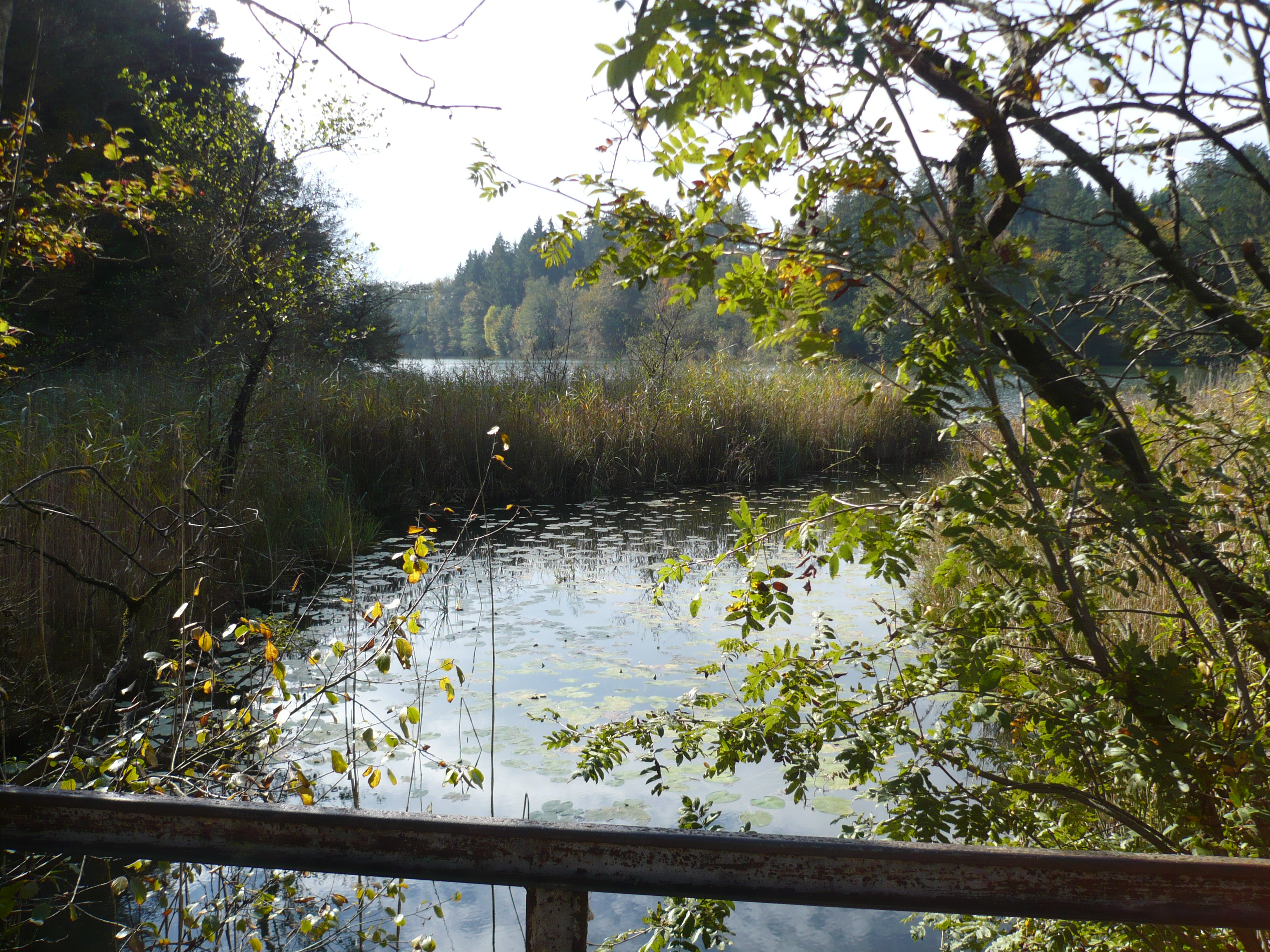 Ischler Achen zwischen Schloßsee und Kautsee